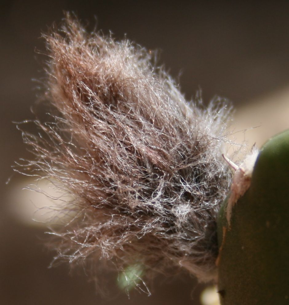 Echinopsis subdenudata virágkezdeménye és bordája